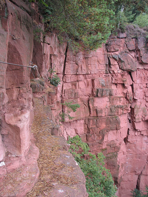 Klettersteig in einem Steinbruch im Mümlingtal bei Breuberg-Hainstadt im hessischen Odenwald. Betreuung durch die Odenwälder Kletterfreunde.